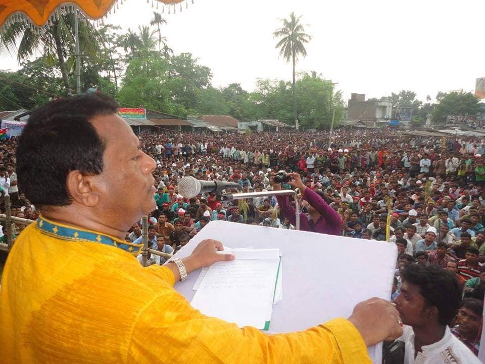 Masiur Rahman 1